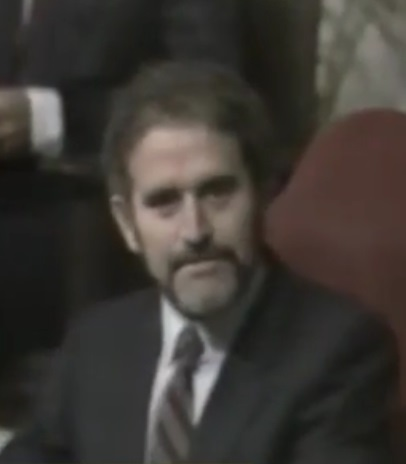 Demetrio Madrid en la entrega de los Premios Castilla y León de 1985.